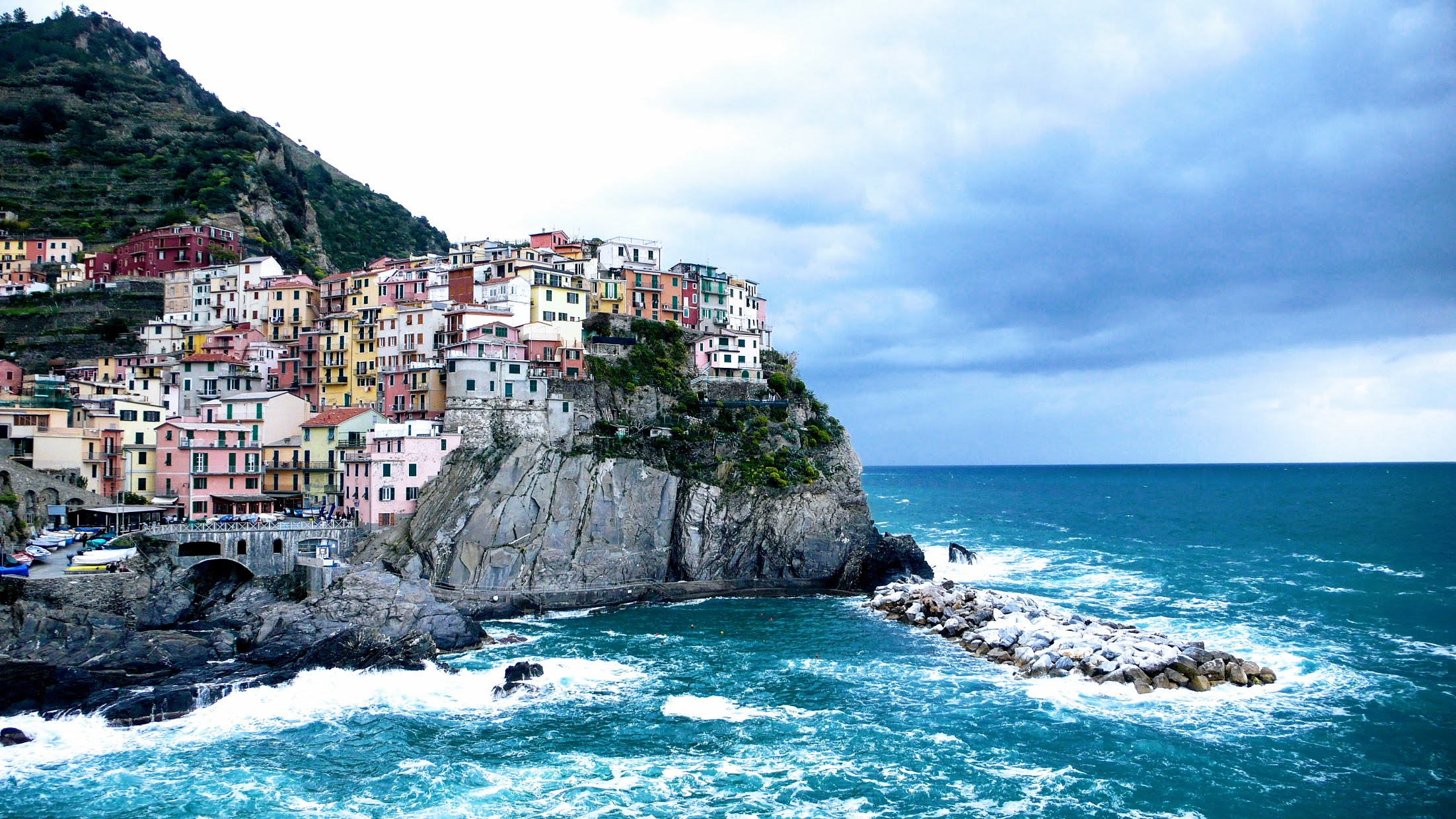 Manarola